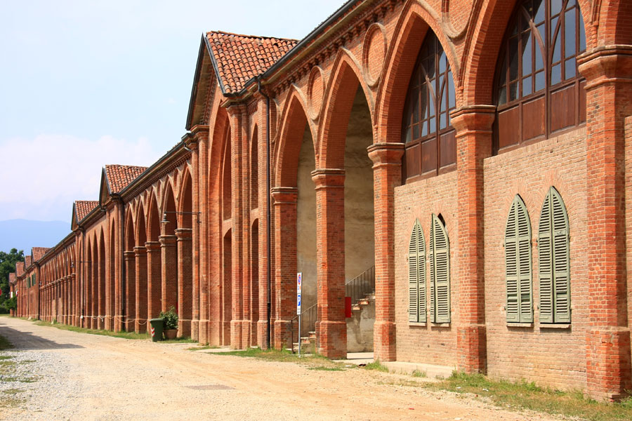 Ala settentrionale di Borgo Castello nel parco naturale "La Mandria" a Venaria Reale (TO) che ospita gli uffici dell'ente parco